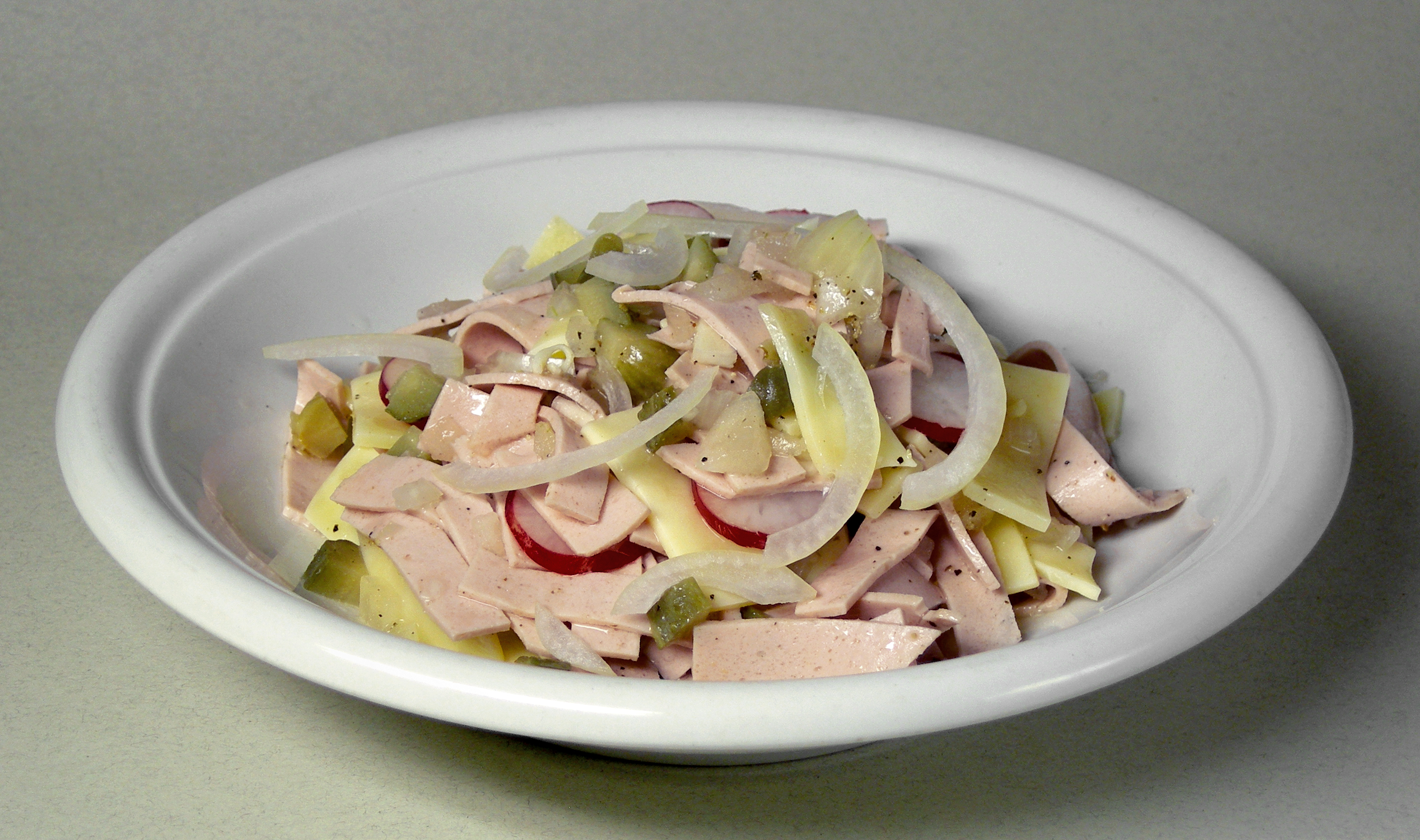 Schweizer Wurstsalat (mit Lyoner Wurst und Emmentaler Käse)